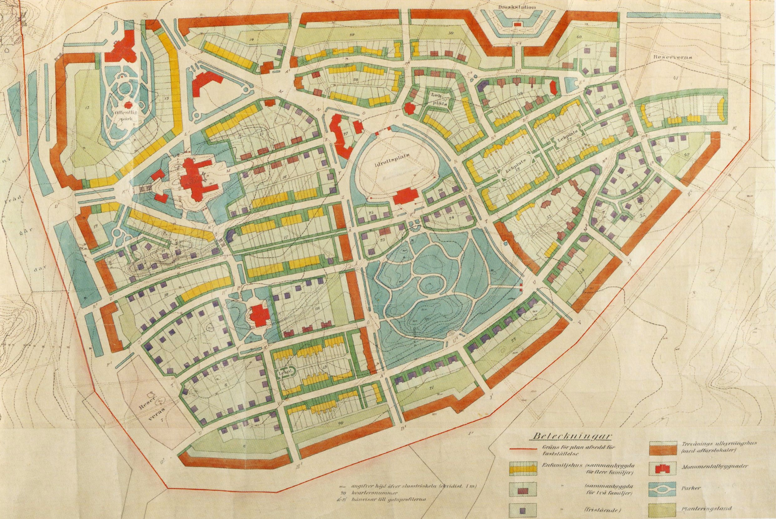 Stadsplan för Enskede trädgårdsstad upprättad 1907 av Stockholms stadsbyggnadskontor genom P.O. Hallman